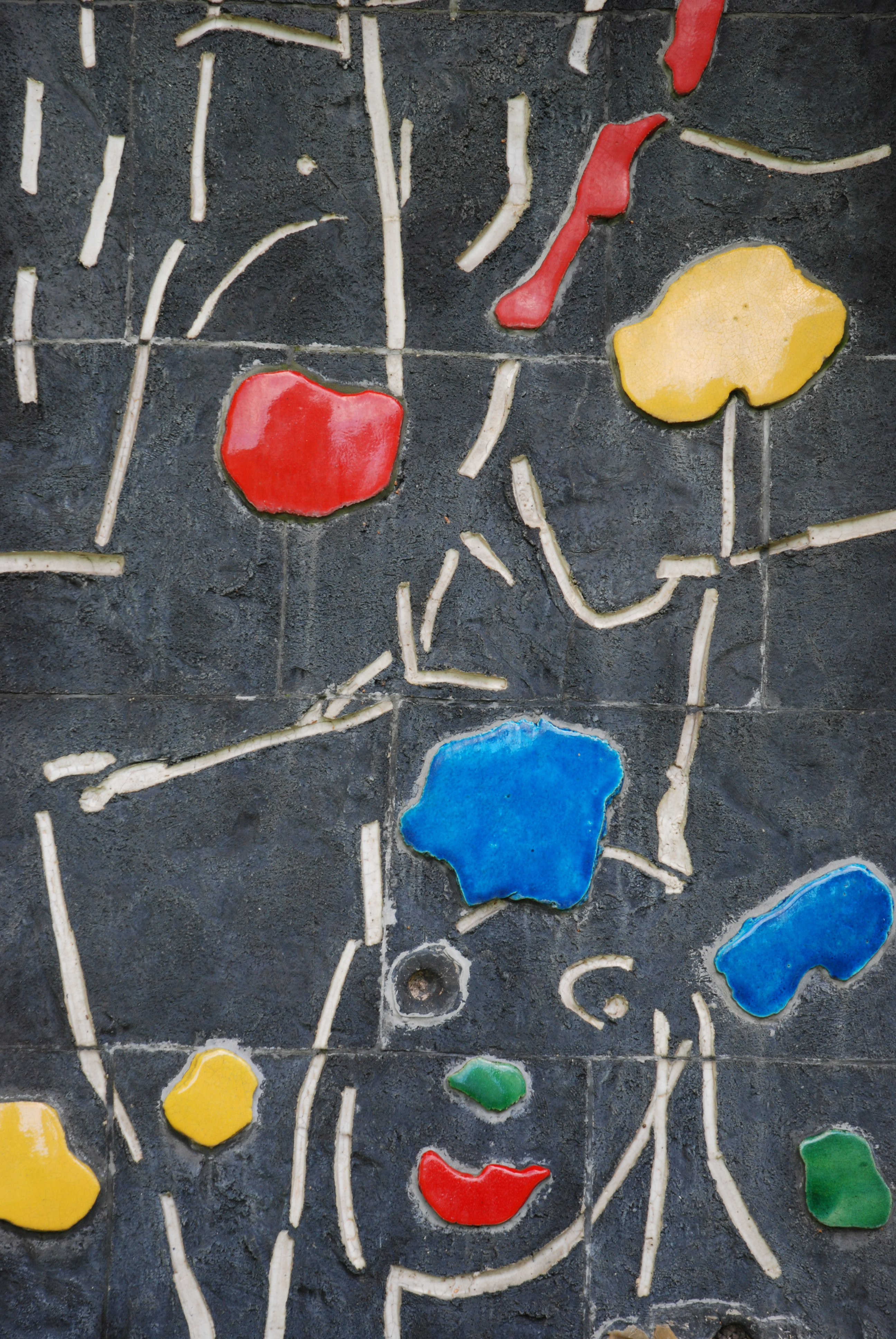 Lennart Rodhe´s Stadens ljus, detail, Marabouparken, Sundbyberg, Sweden